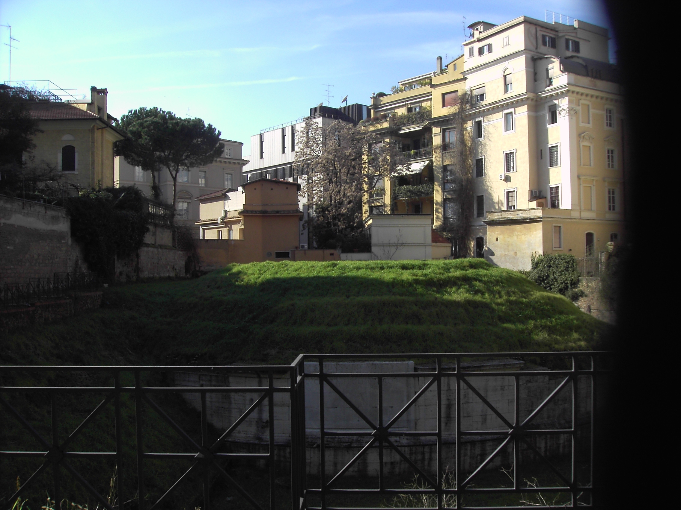 Roma, sepolcro di Lucilio Peto a via Salaria